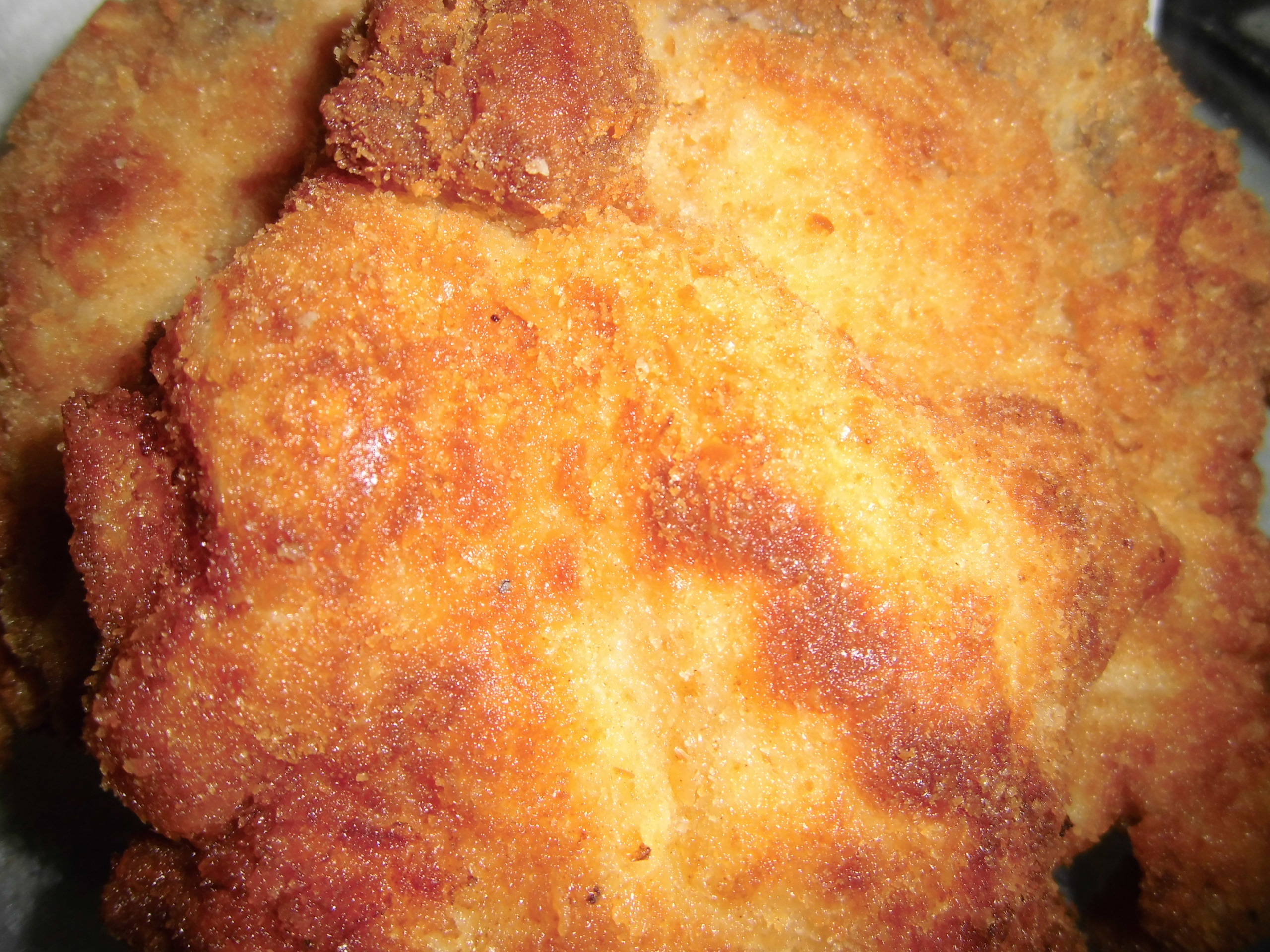 Detail řízku